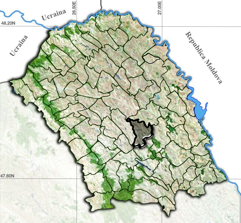 Gorbanesti jud Botosani.